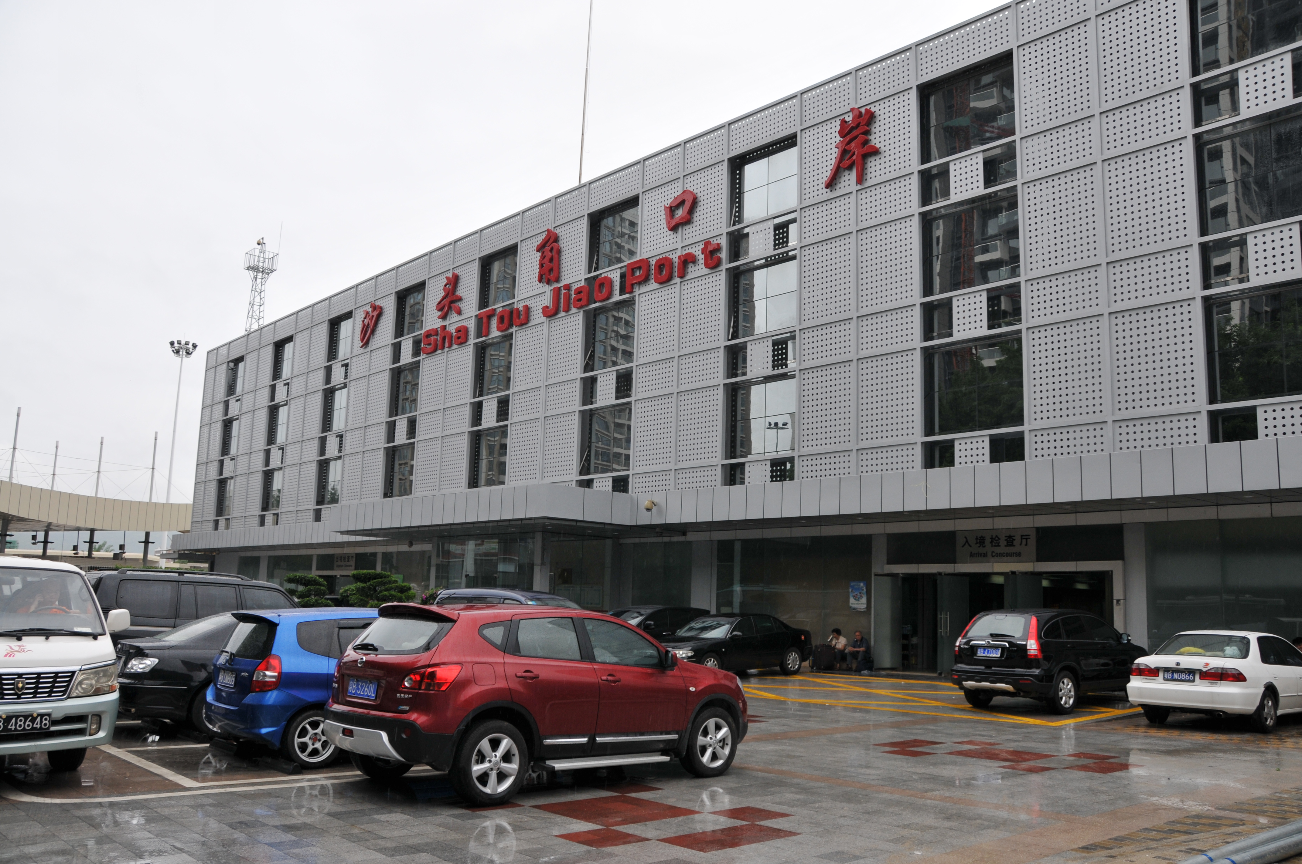 中国側から見た沙頭角口岸